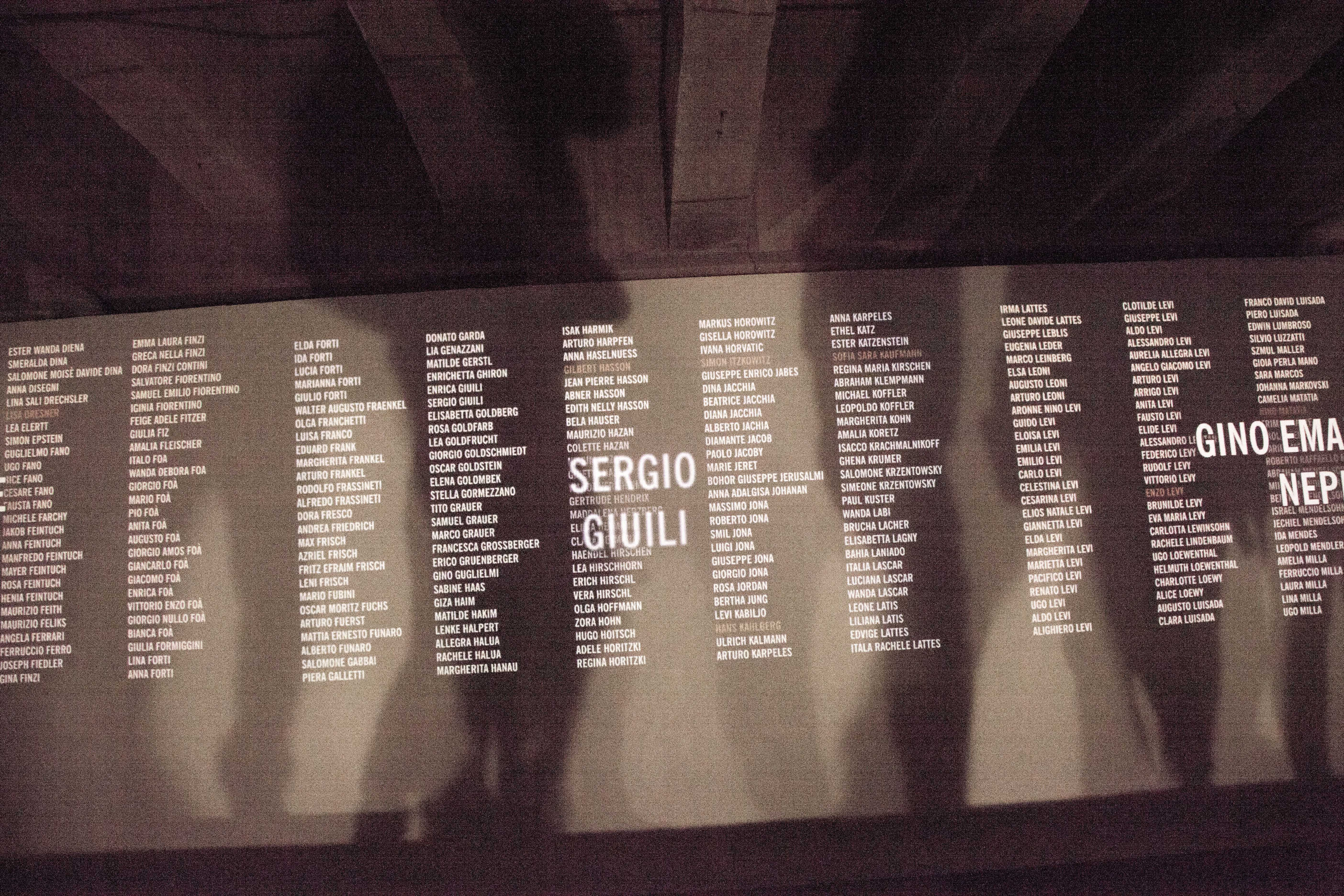 קיר הזיכרון המציג את השמות של היהודים שנשלחו מרציף 21